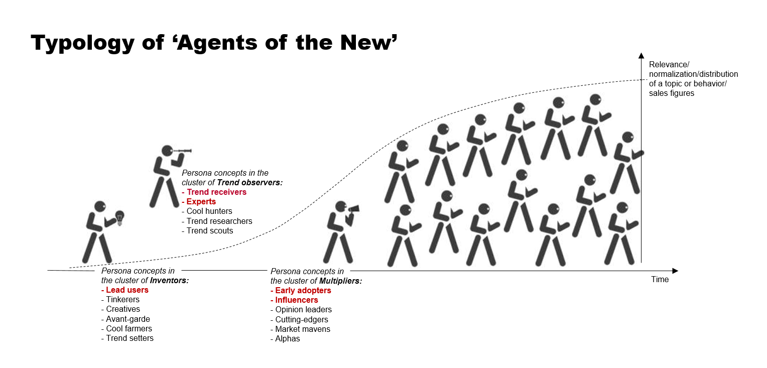 Typology Agents of the New